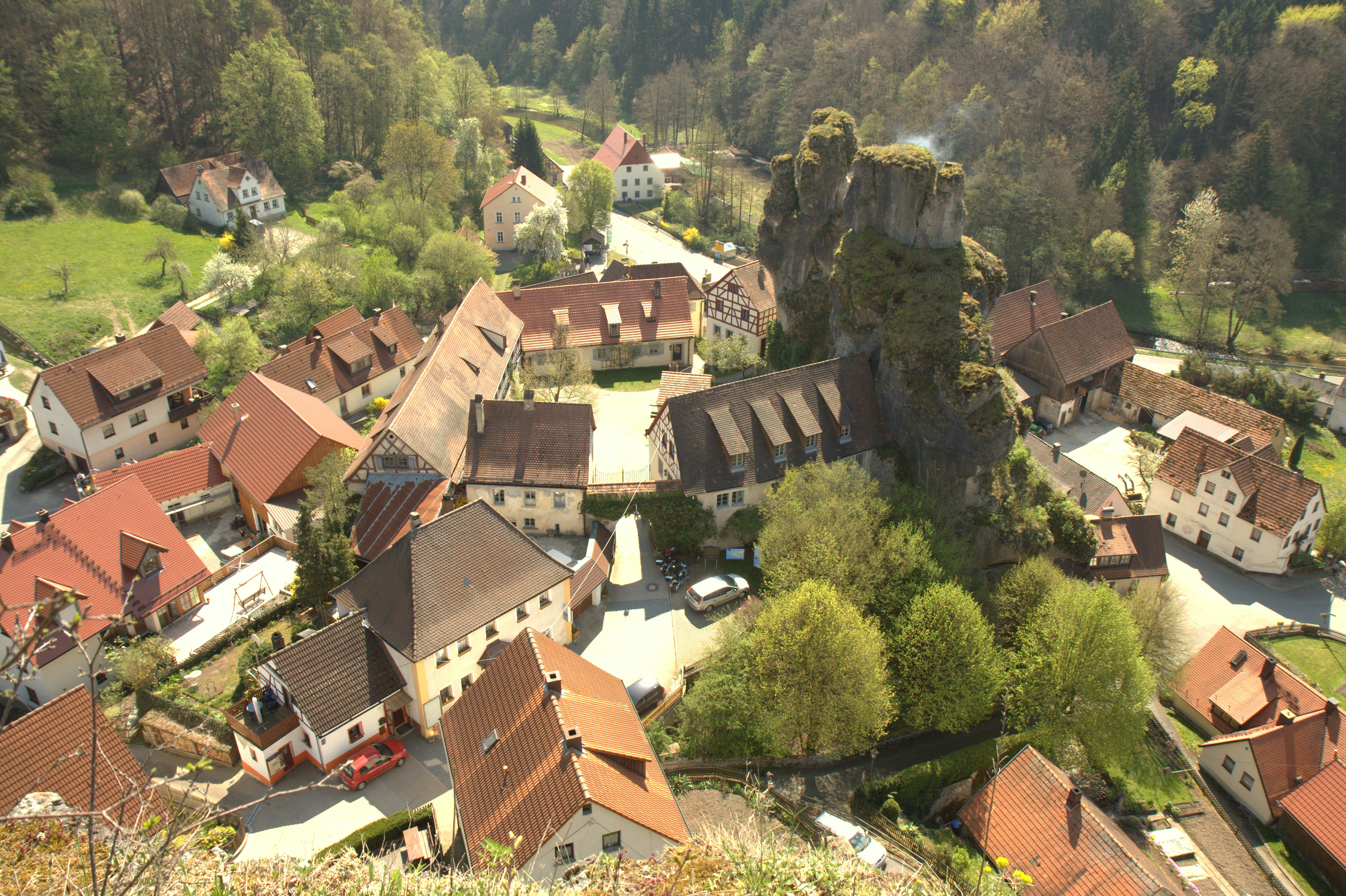 Burg Niederntüchersfeld - Gesamtansicht